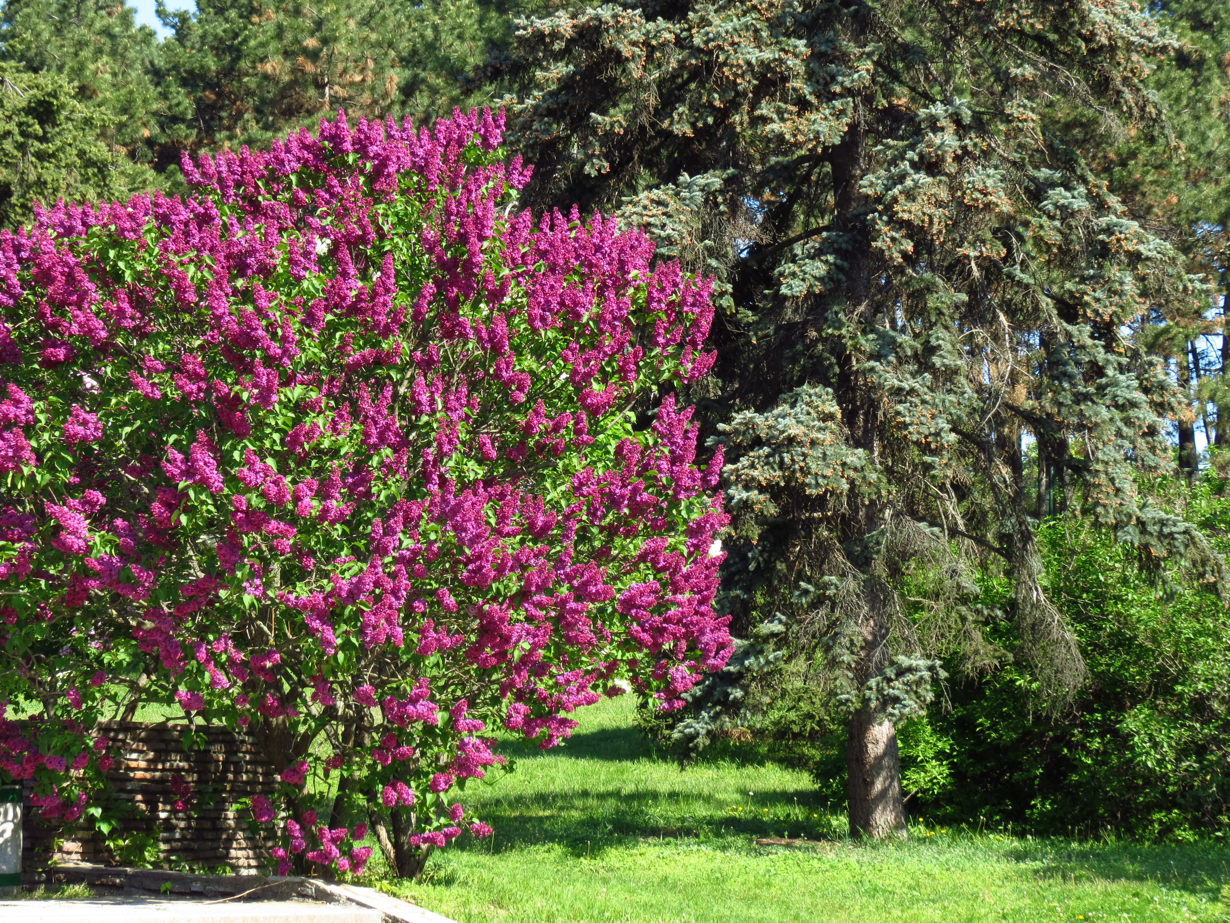 Національний ботанічний сад ім. М.Гришка, Печерський район